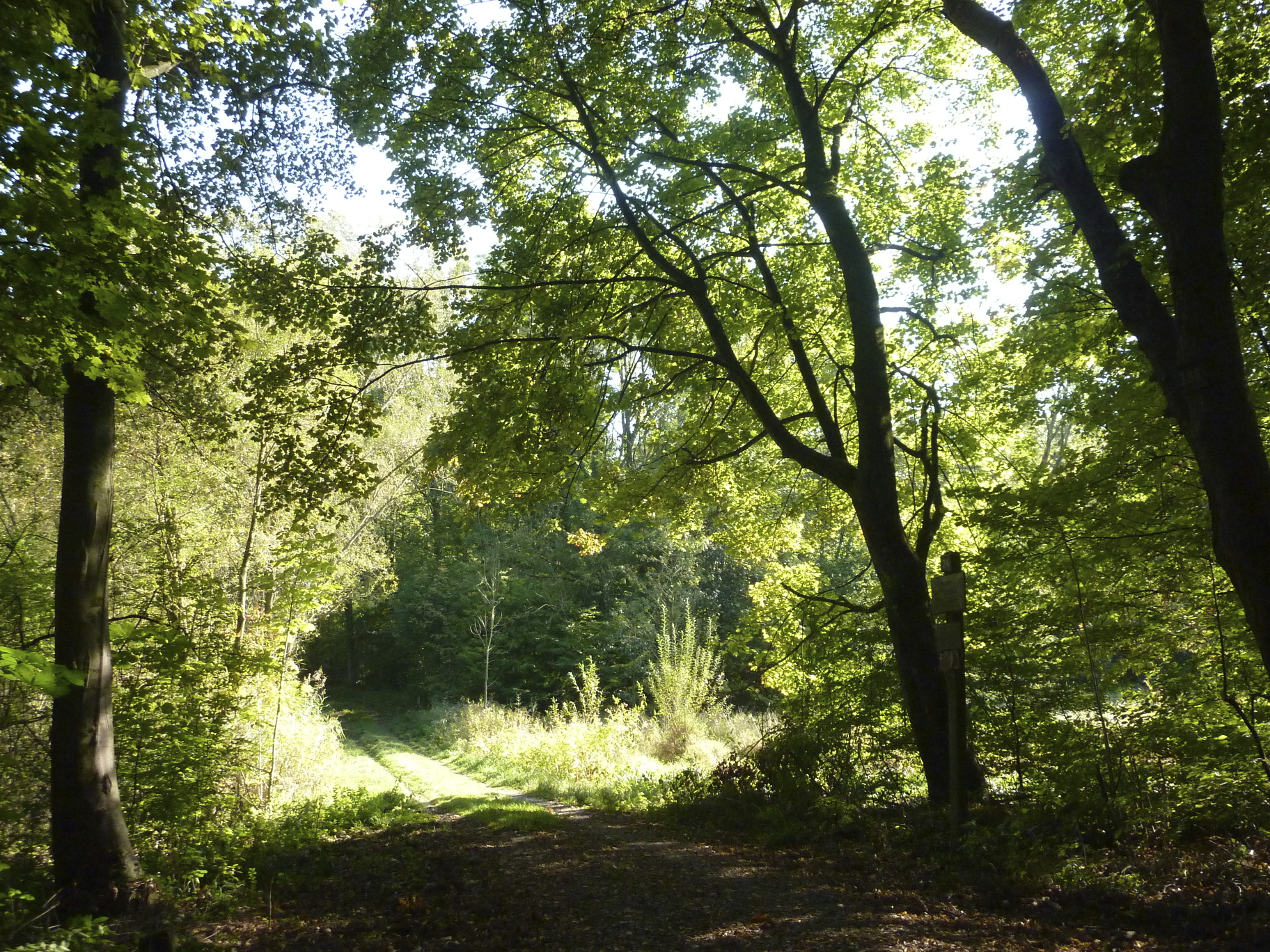 Hessen bei Frankfurt am Main: Die Kelster (auch Kelsterbach genannt) ist ein gut fünf Kilometer langer linker beziehungsweise südlicher Zufluss des Mains. Sie entspringt auf dem Gebiet des Frankfurter Stadtwaldes und mündet in der südwestlich davon gelegenen Stadt Kelsterbach in den Main. Das Foto zeigt eine Ansicht der Wanzenschneise im westlichen Stadtwald. In der Bildmitte ein Abschnitt der Riedwiese, an deren Rand die Kelster entlangfließt. Blick nach Südosten.